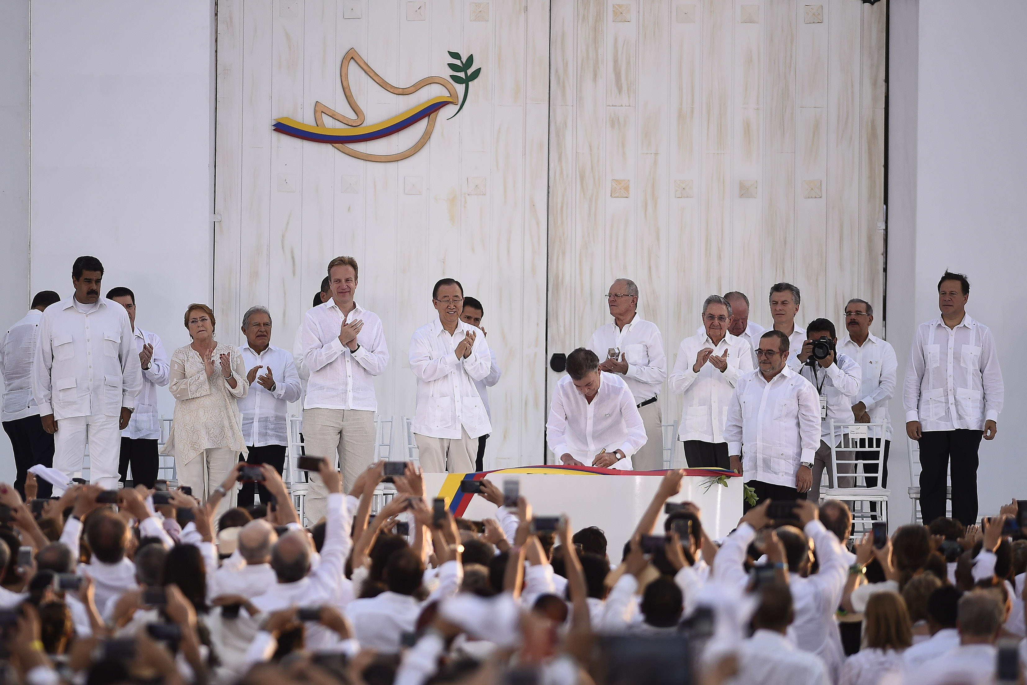 Gobierno de Chile